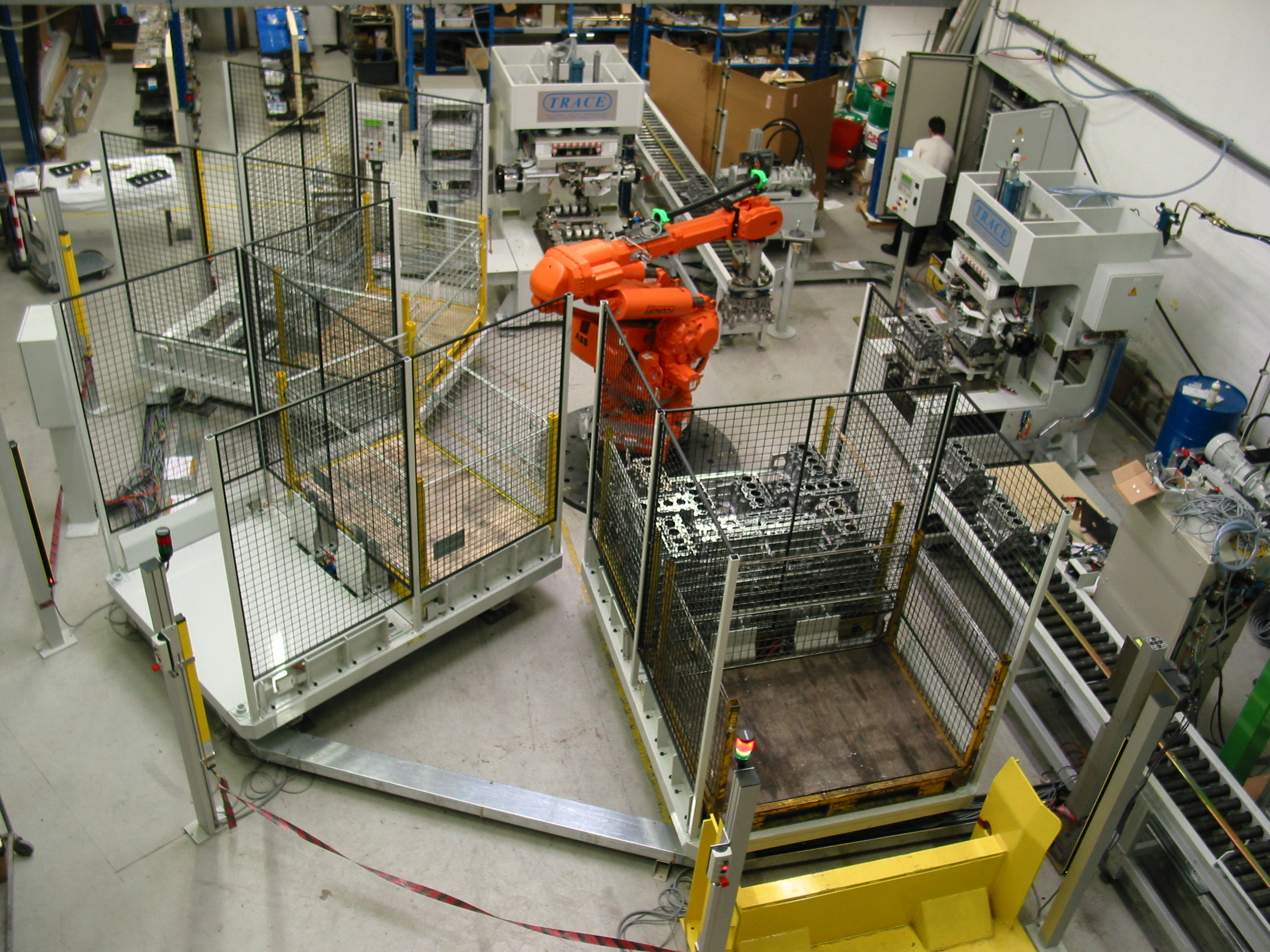 Ilot robotisé de contrôle d'étanchéité air/air composé de deux machines d'un robot de manutention et de trois plateaux supportant chacun deux bacs d'expedition